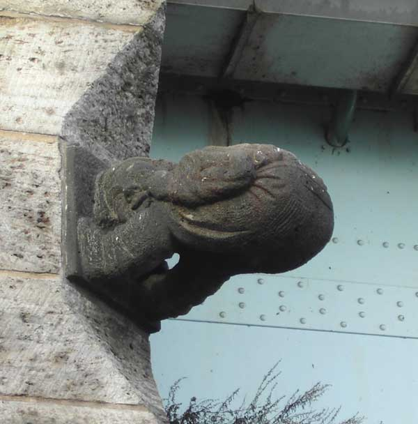 Das Brückenmännchen an der Kennedybrücke in Bonn, Deutschland.